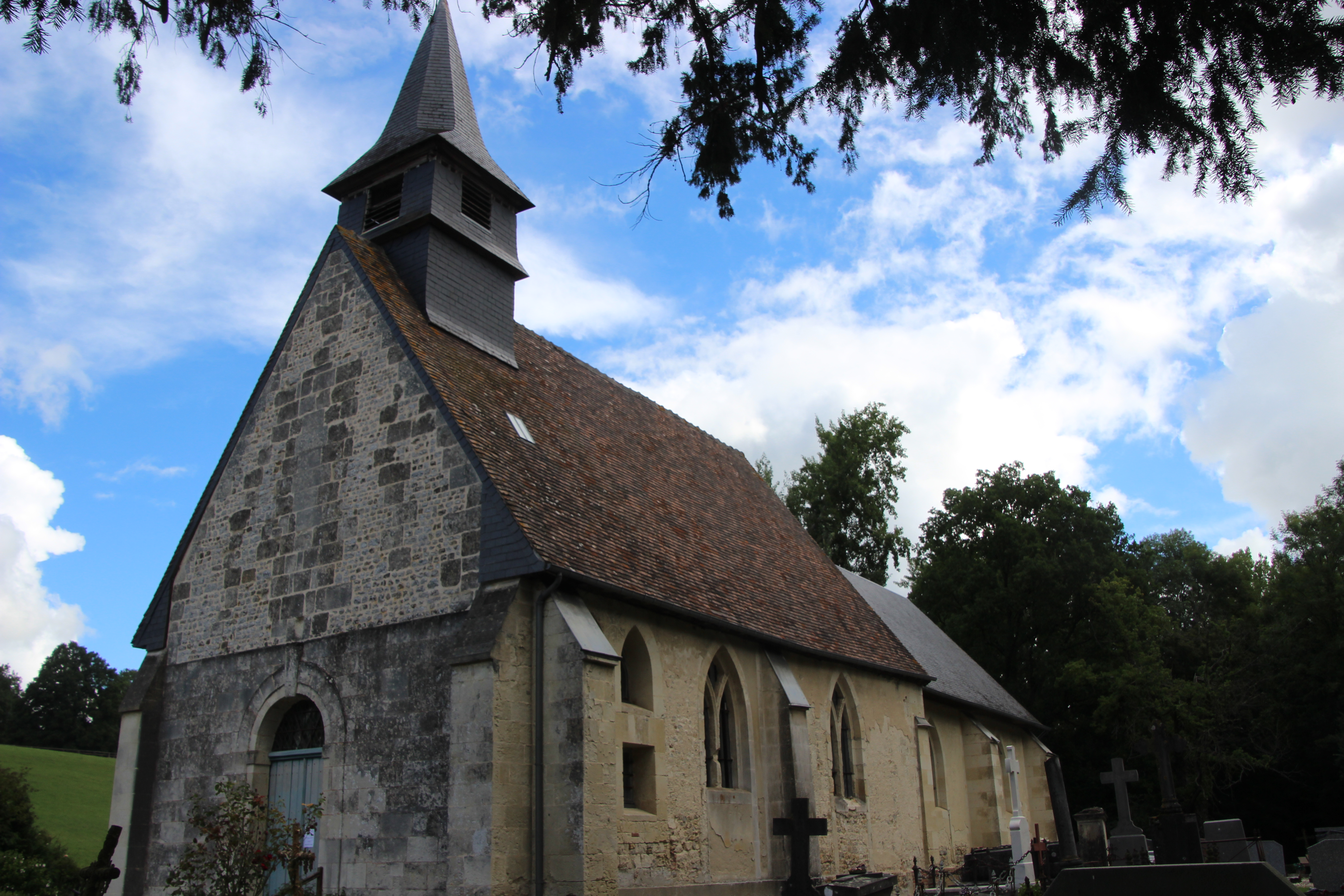 église Formentin